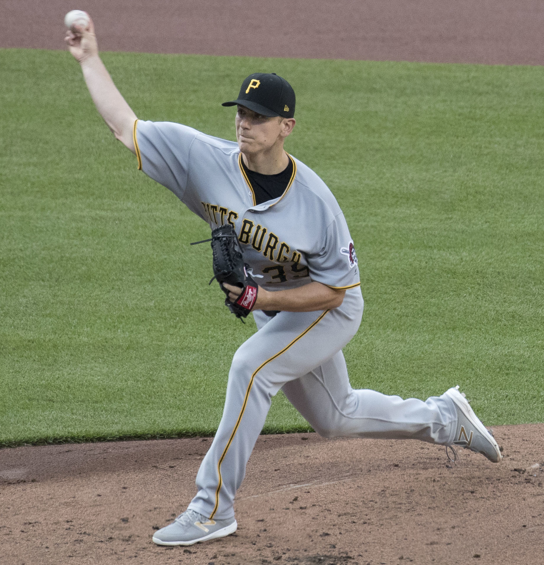 Pirates at Orioles 6/7/17